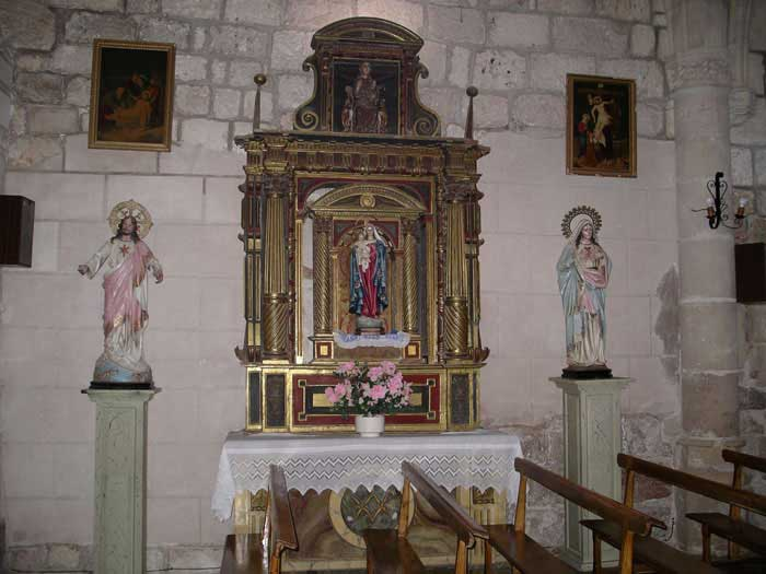 Retablo Nuestra Señora del Rosario